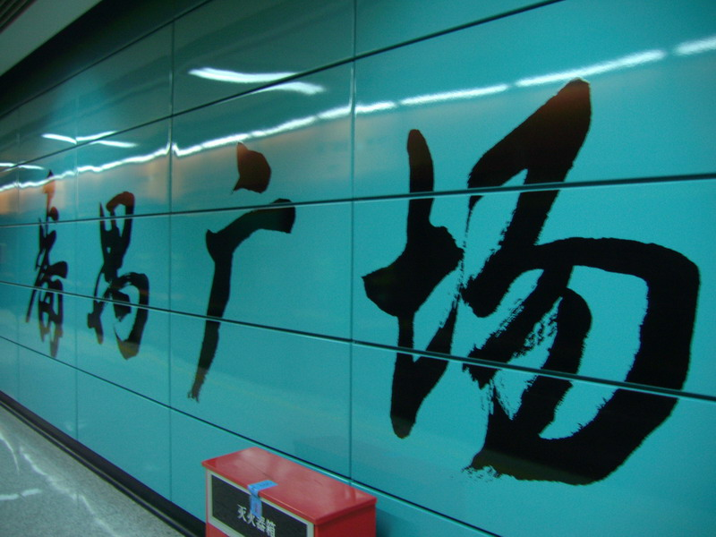 广州地铁番禺广场站